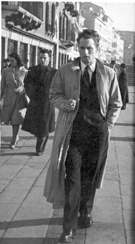 foto di un autore e poeta contemporaneo